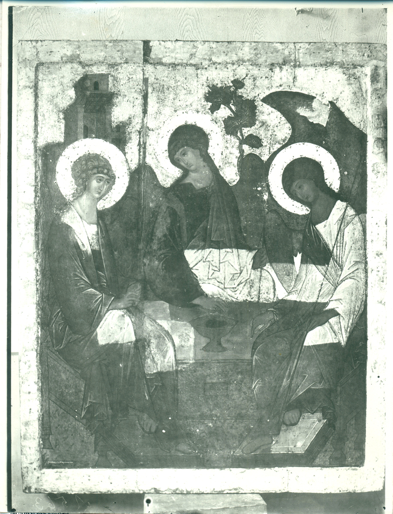 "Trinity" during restauration in 1918-1919. Икона в процессе расчистки 1918-1919 годов.